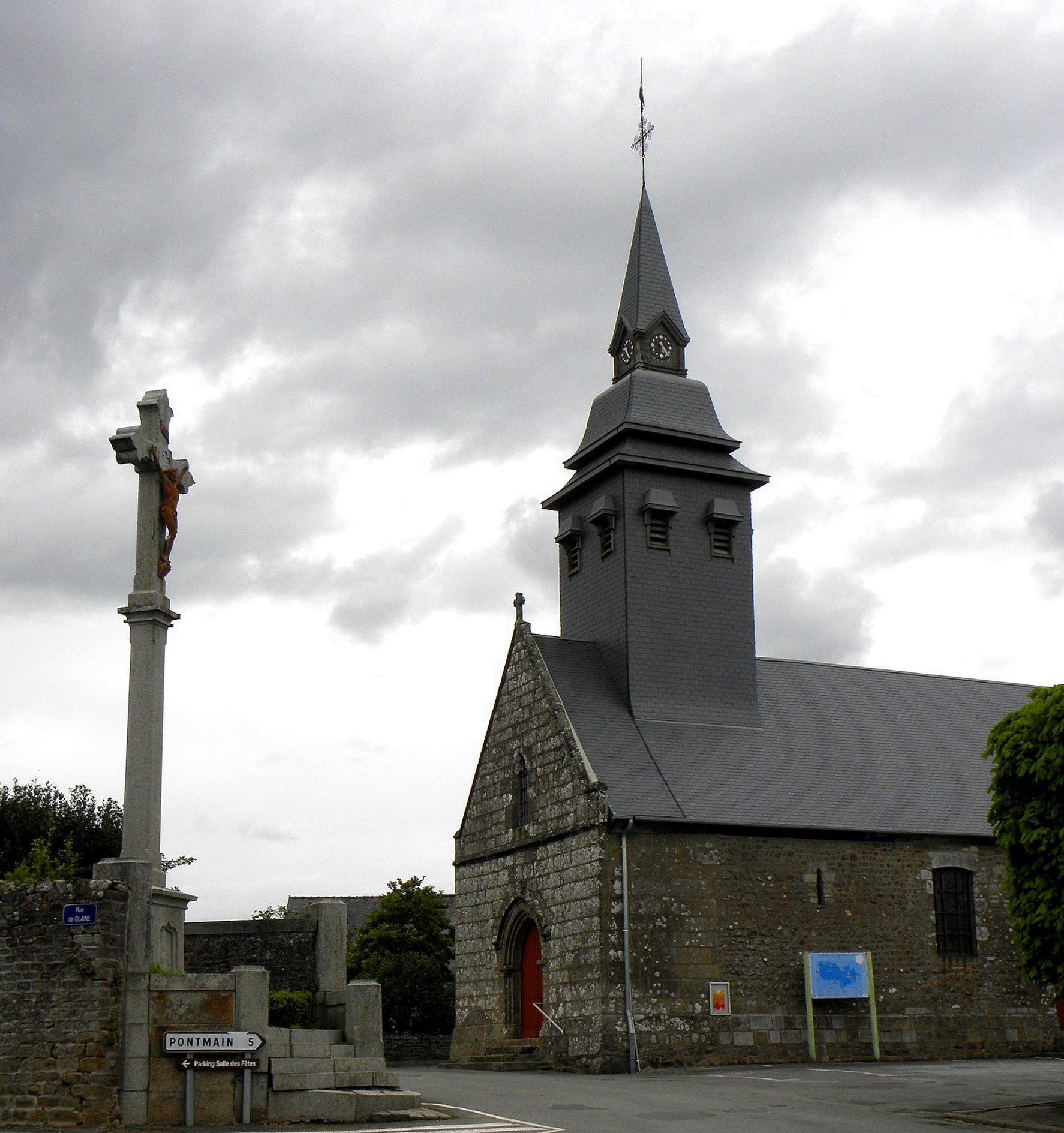 Église Saint-Ellier de Saint-Ellier-du-Maine (53). Façade occidentale et flanc sud.